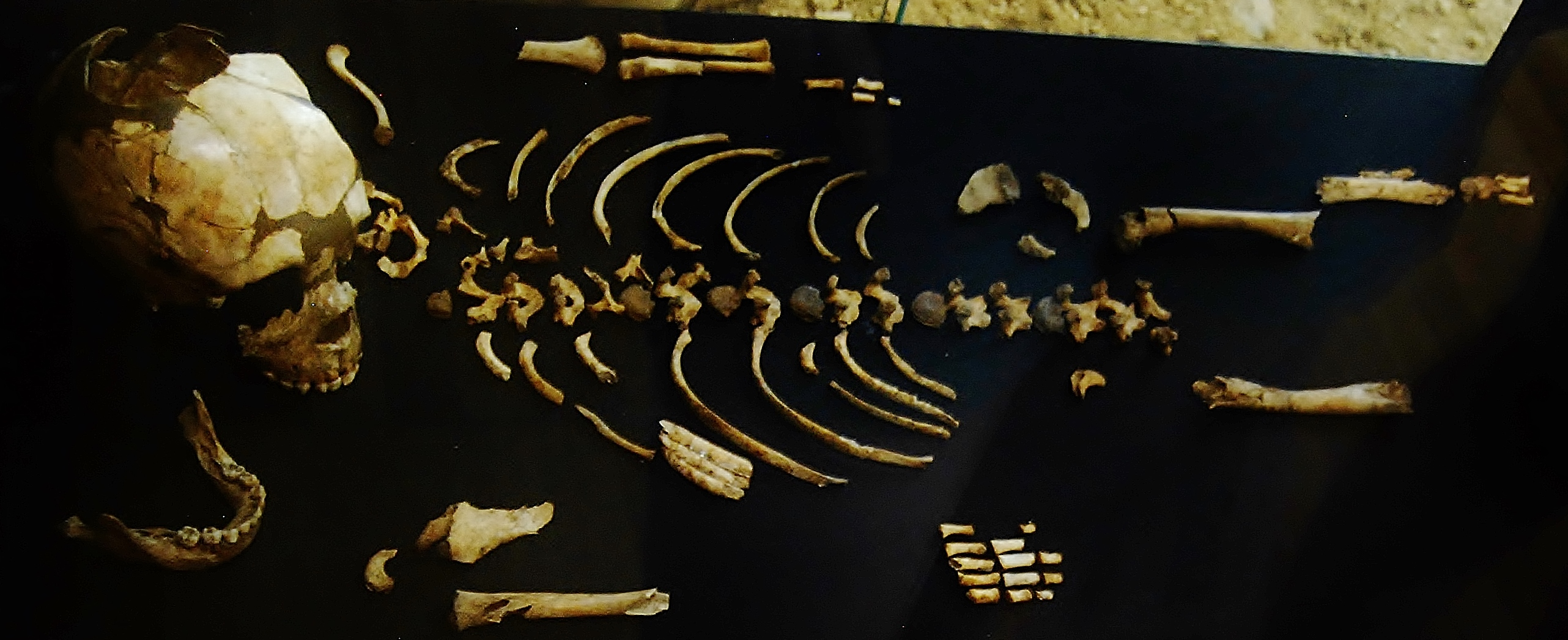 Squelette d'un enfant néandertalien, découvert sur le site du Roc de Marsal, Dordogne. Musée national de Préhistoire, Les Eyzies-de-Tayac, France